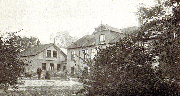 Saunsøgård er oprettet i 1860 af brødre Casse. Saunsøgård er nu en avlsgård under Gottesgabe. Gården ligger i Vestenskov Sogn, Lollands Sønder Herred, Maribo Amt, Rudbjerg Kommune. Hovedbygningen er opført i 1880.